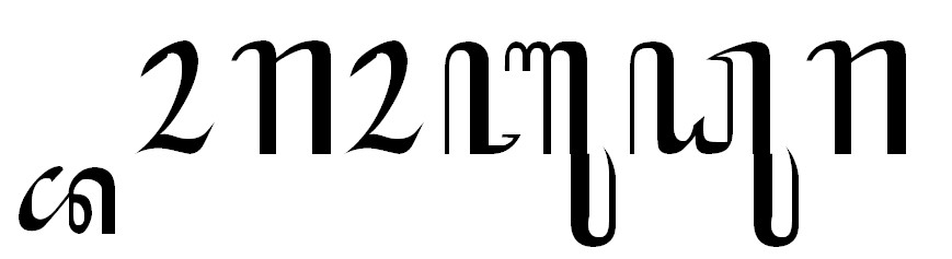 Боробудур на яванском языке шрифтом Hanasaraka